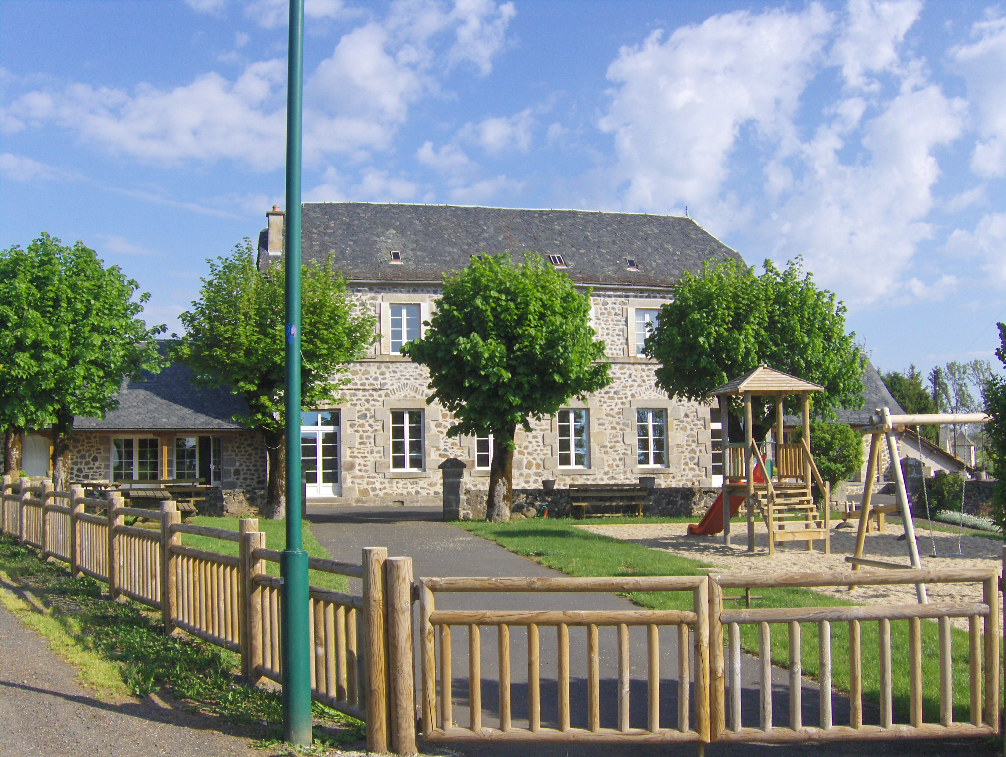 Gîte de Groupe qui peut accueillir 41 couchages